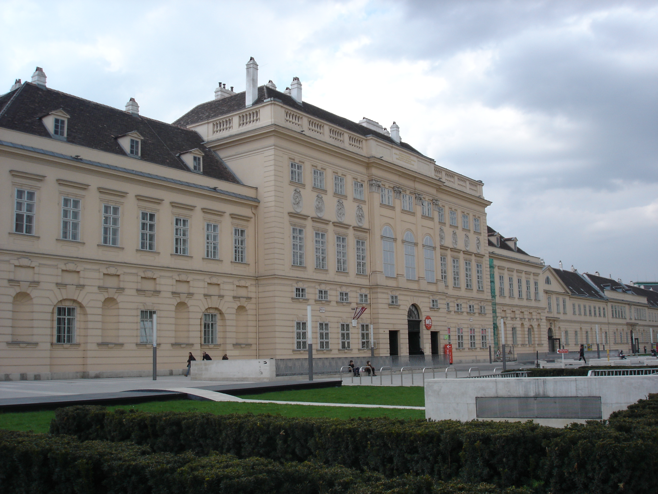 Museumsquartier, Vienna